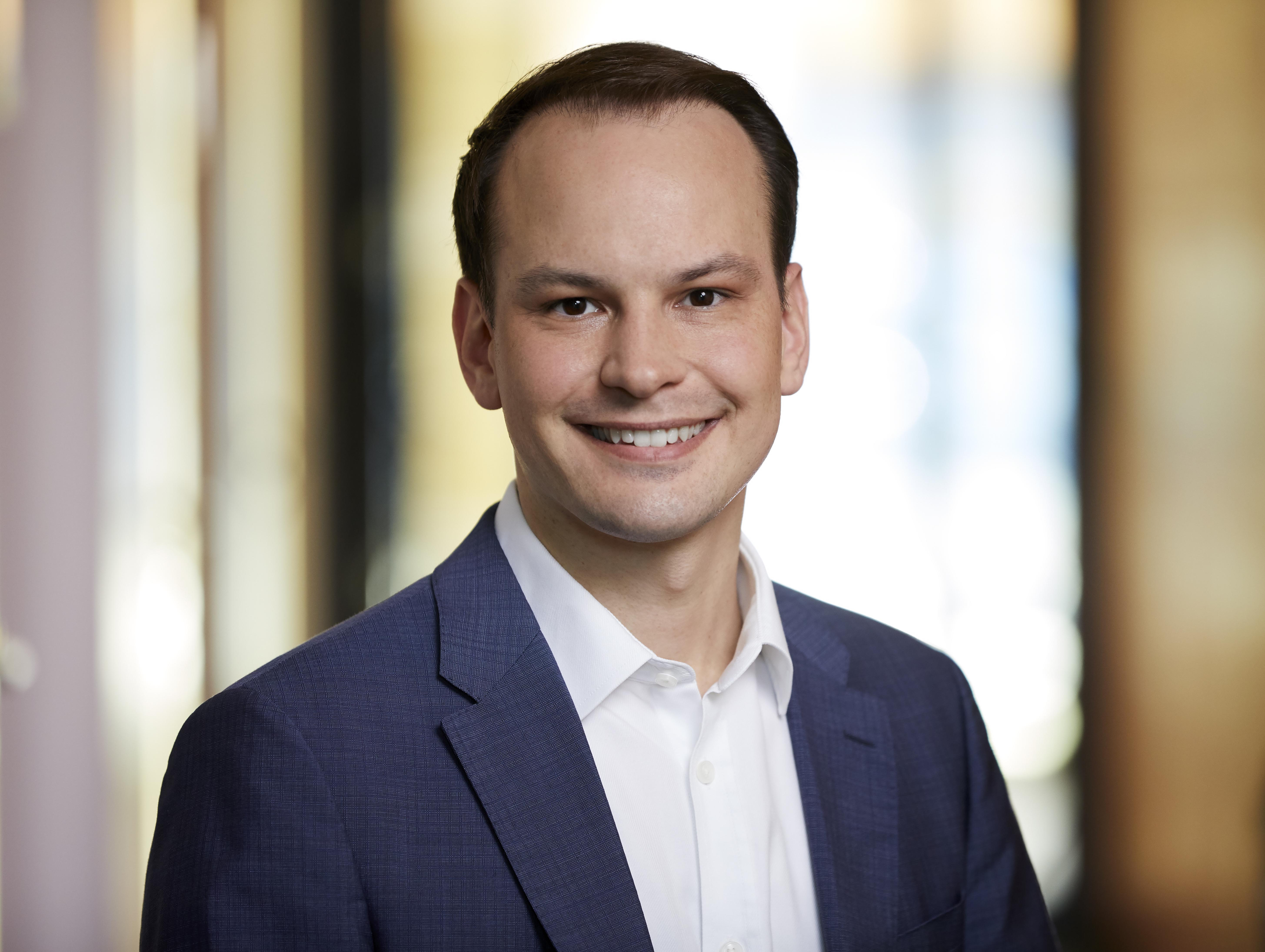 Matthias Fischbach